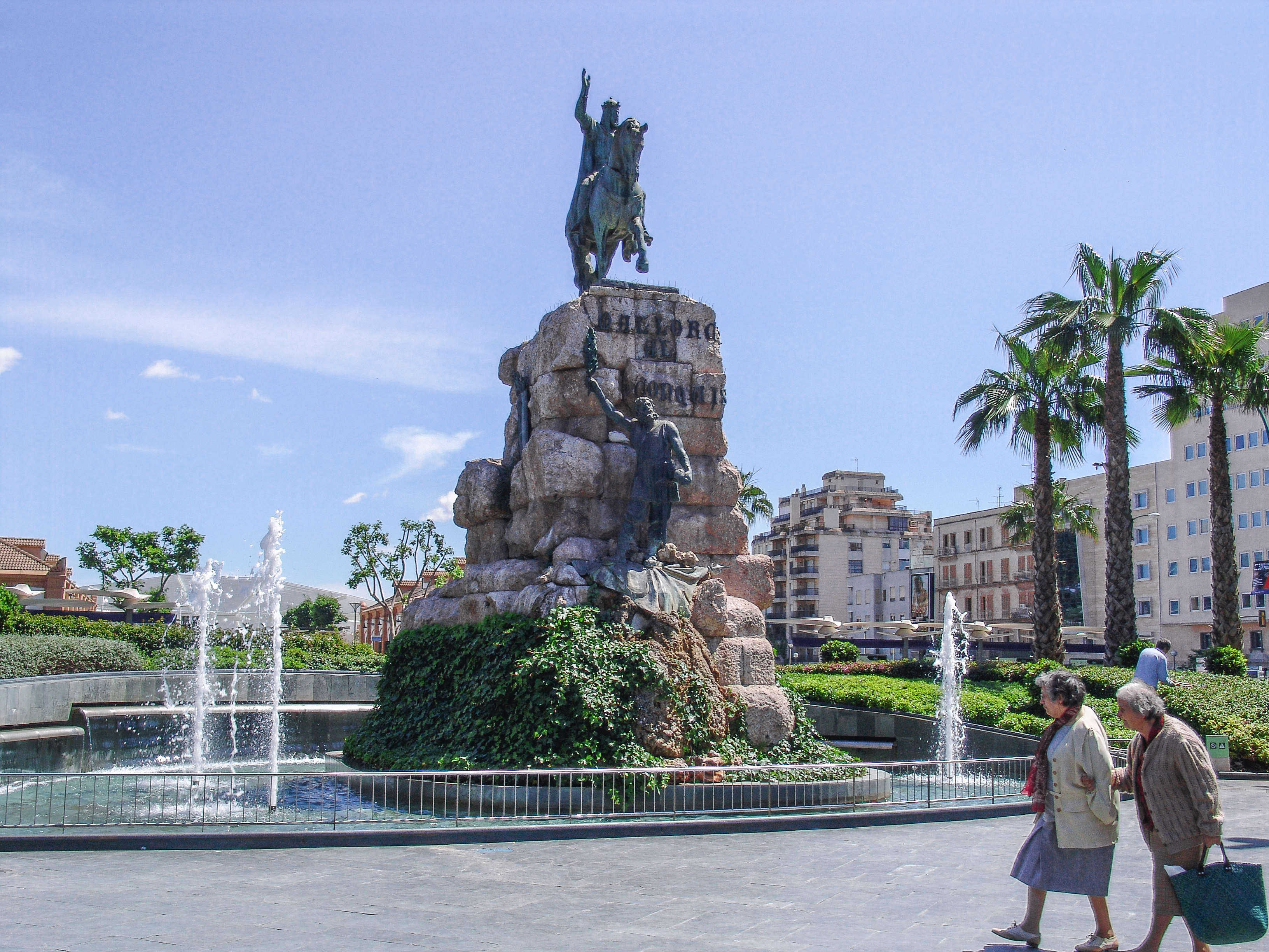 Reiterstatur auf einem Platz in Palma